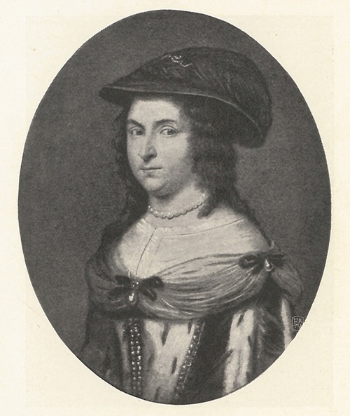 Hedevig Ulfeldt, grevinde af Slesvig-Holsten (1626–1678), efter maleri på Ovesholm. Fra I.A. Fridericia: Danmarks Riges Historie IV, 1902, s. 233